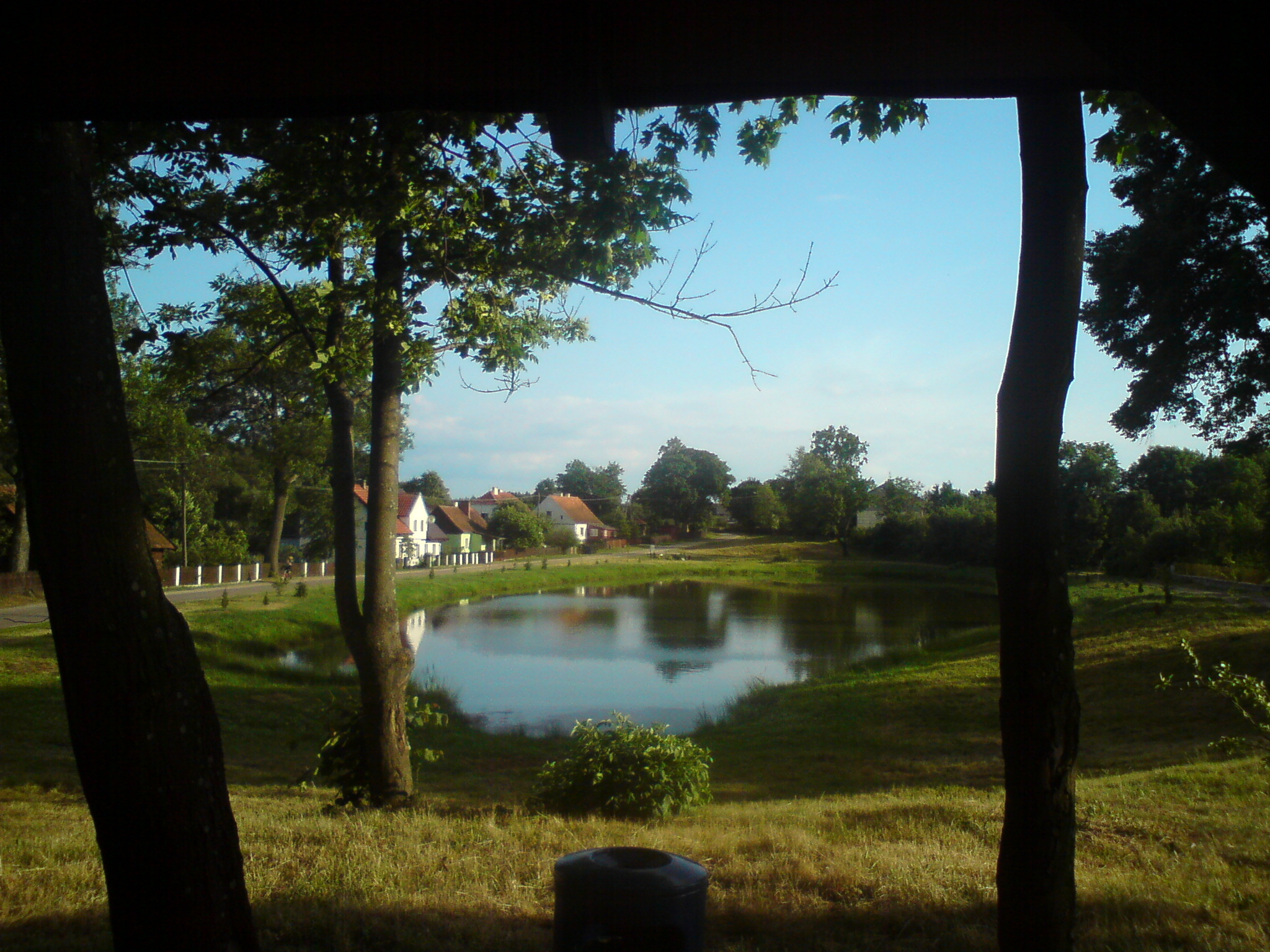 Staw w Dobrzyniu